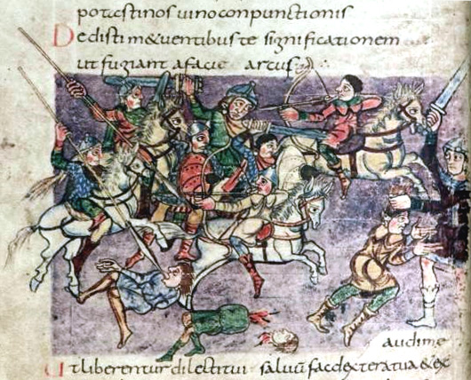 Abbildung aus dem Stuttgarter Psalter